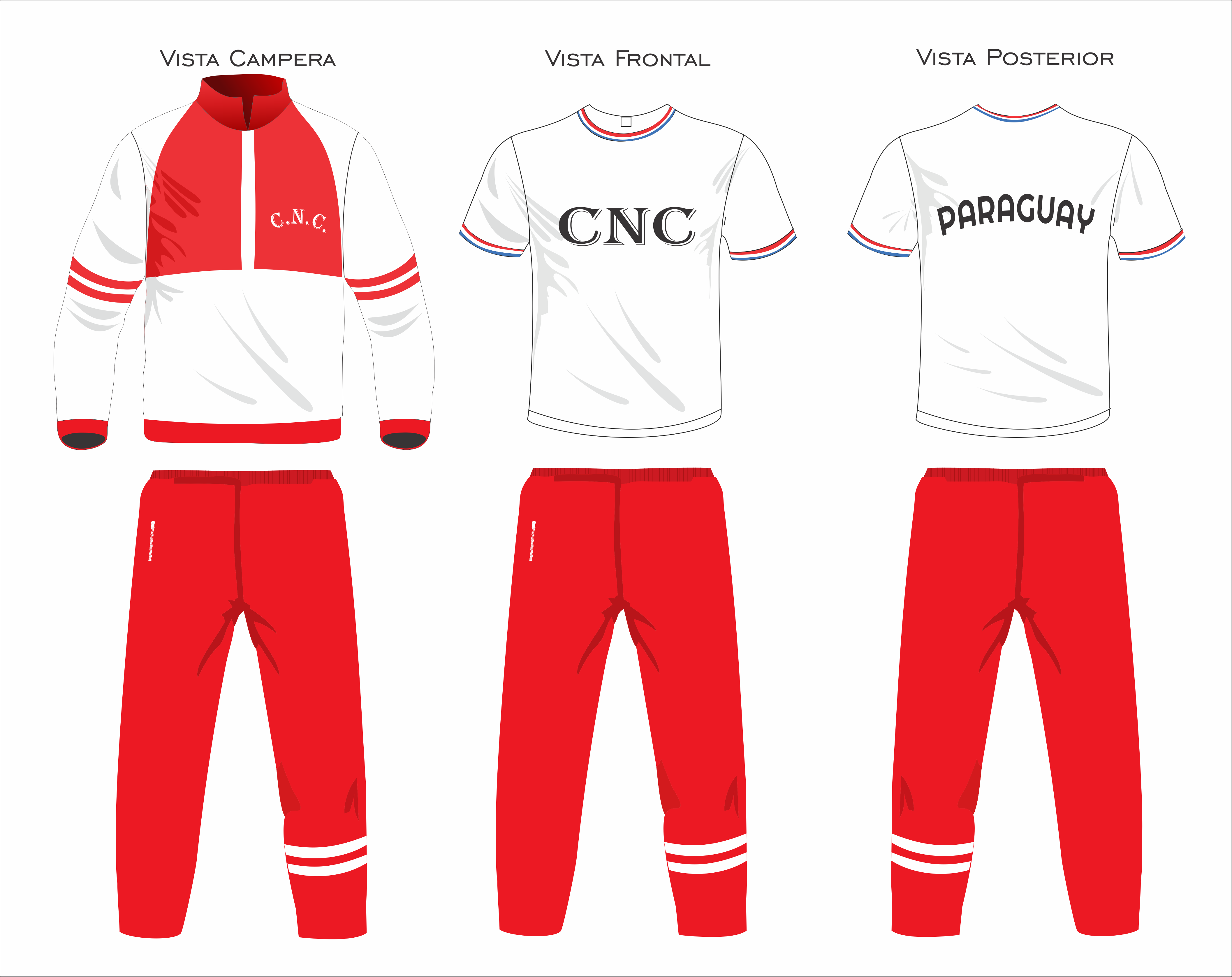 Buzo de los alumnos del Colegio Nacional de la Capital "Gral. Bernardino Caballero"